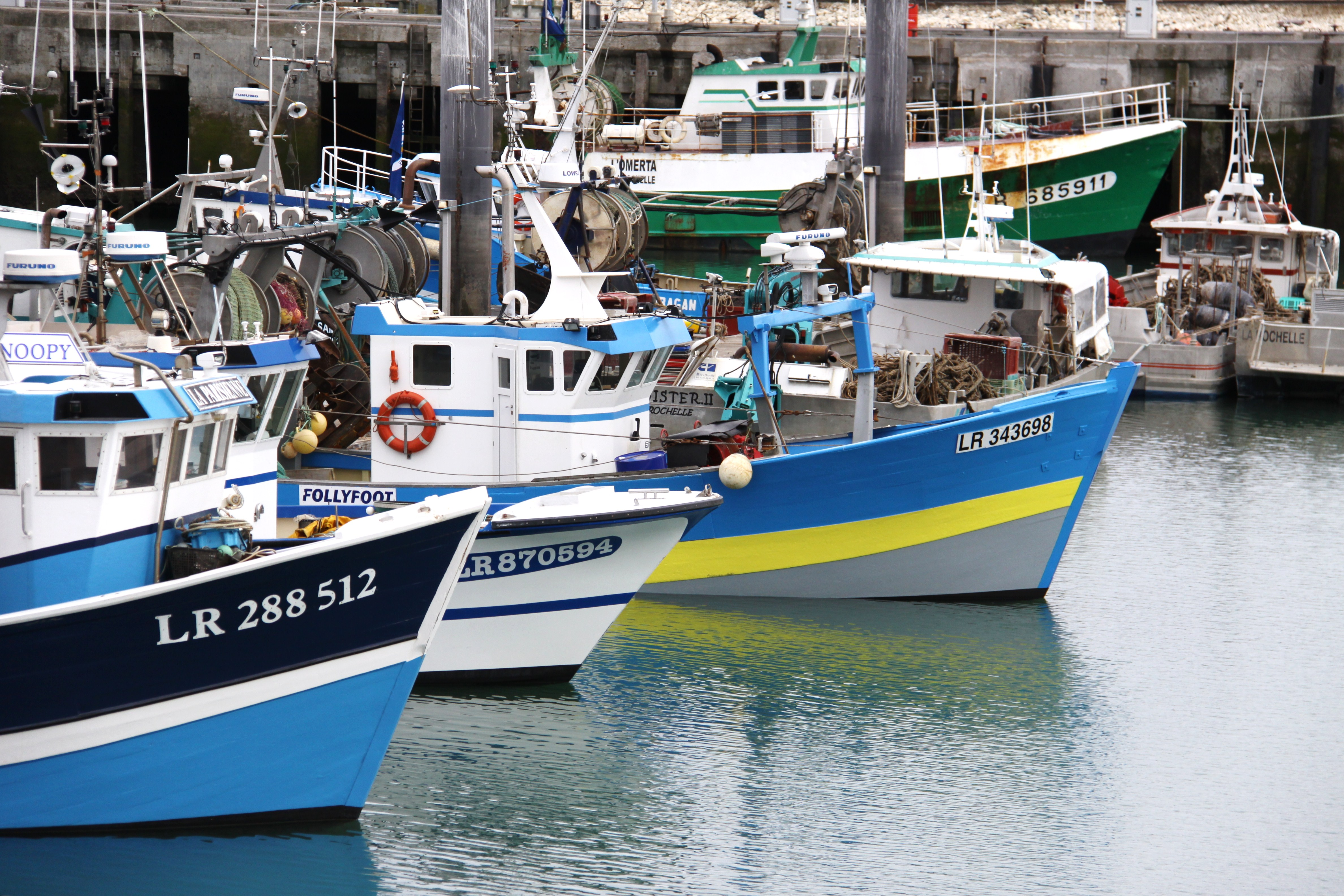 Des chalutiers de pêche côtière amarrés dans le port de pêche de Chef de Baie. La Rochelle (Port de Pêche de Chef de Baie), Charente Maritime, France.